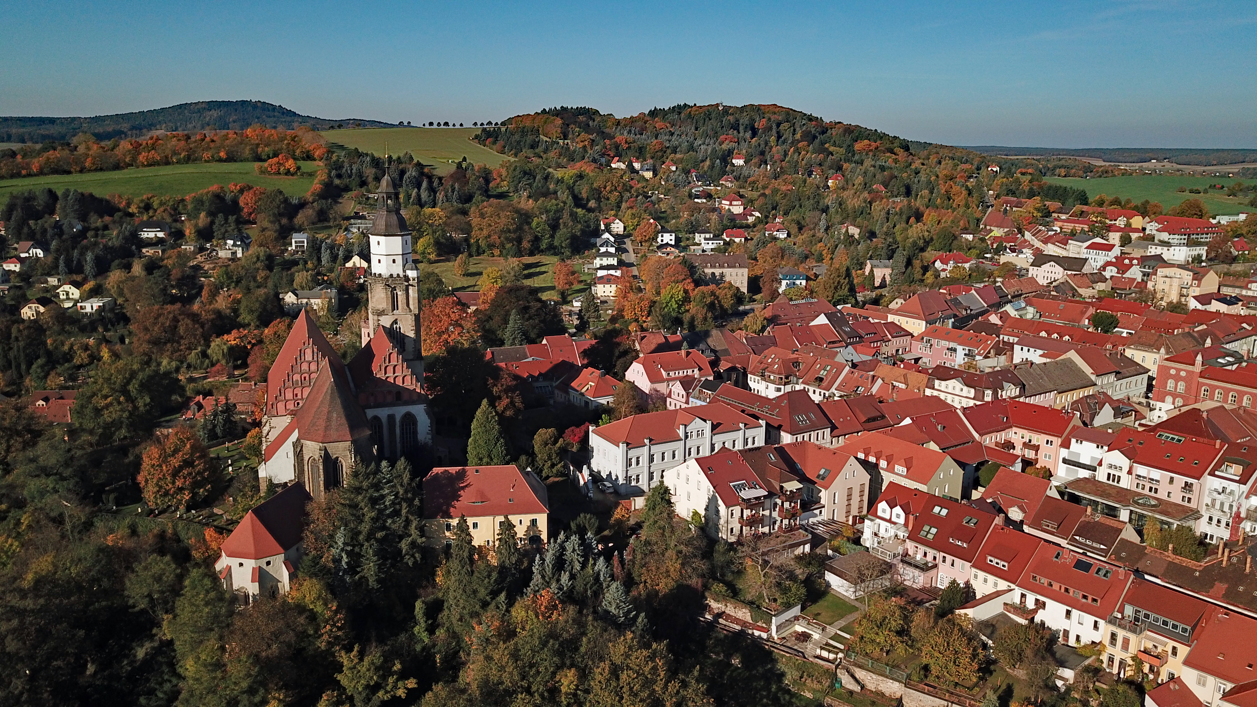 Kamenz aus der Luft (Blick nach Westen)